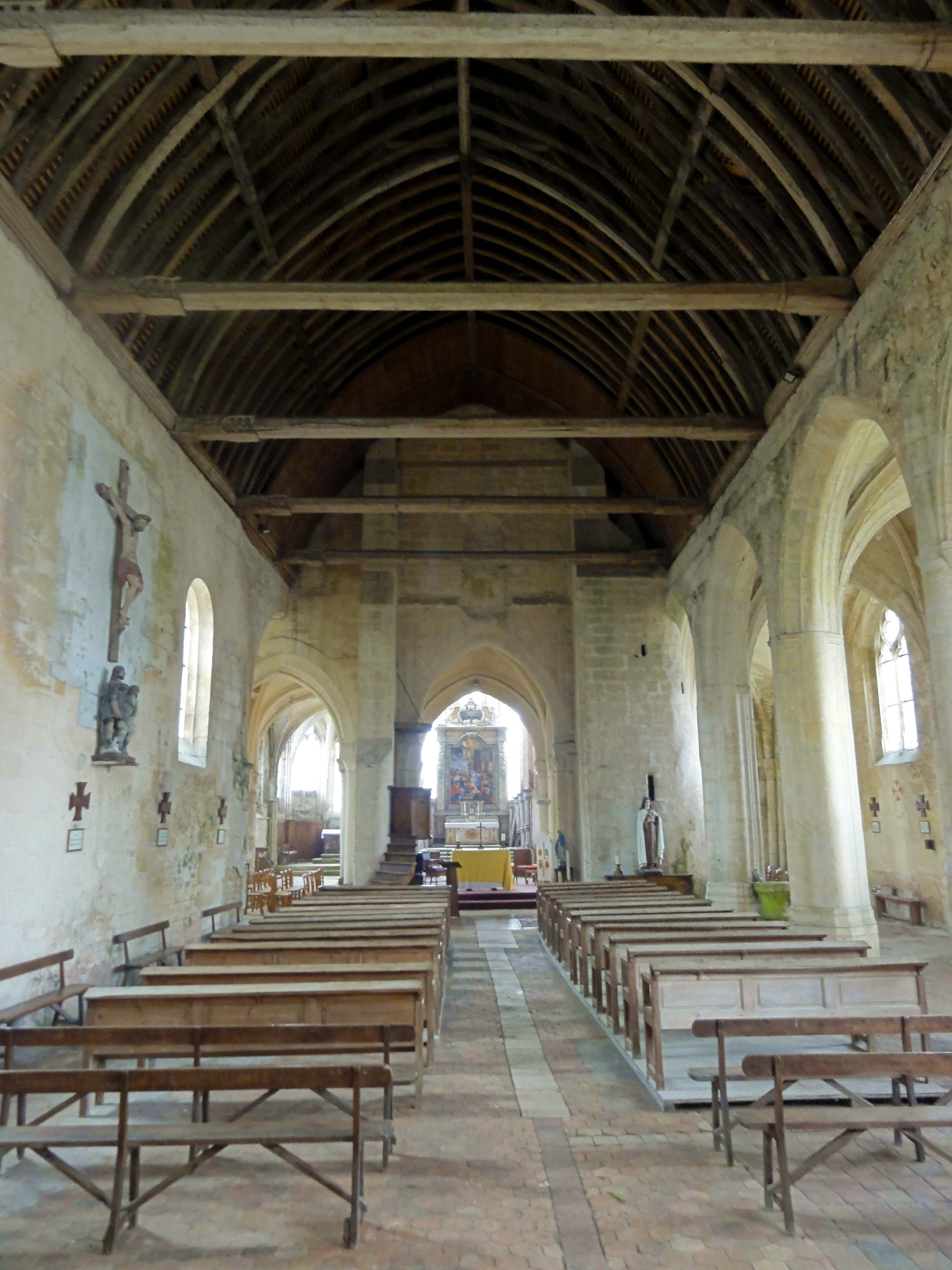 Intérieur de l'église (voir titre).